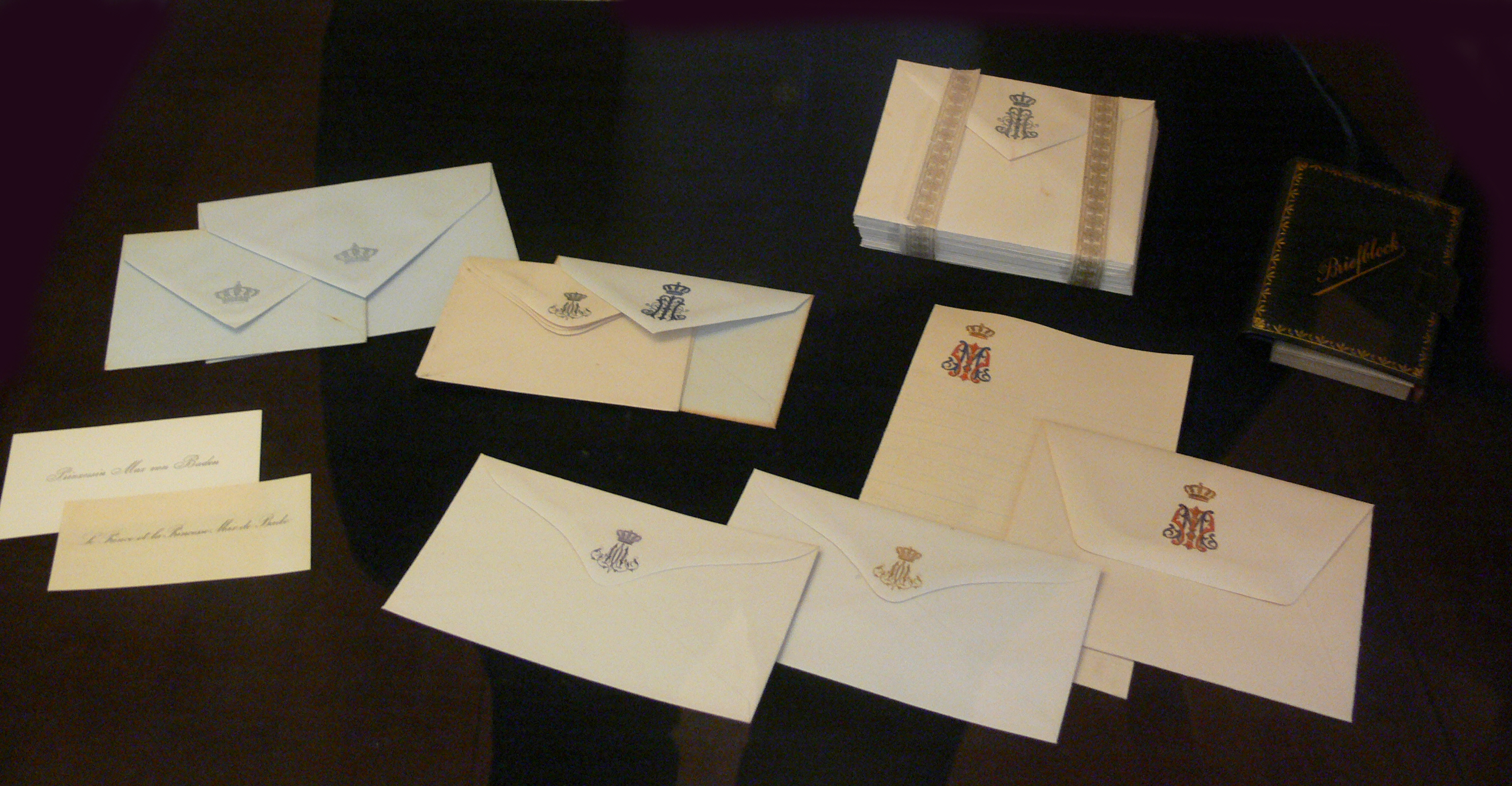 Briefpapier der Prinzessin Max von Baden (= Maria-Luise von Hannover-Cumberland)